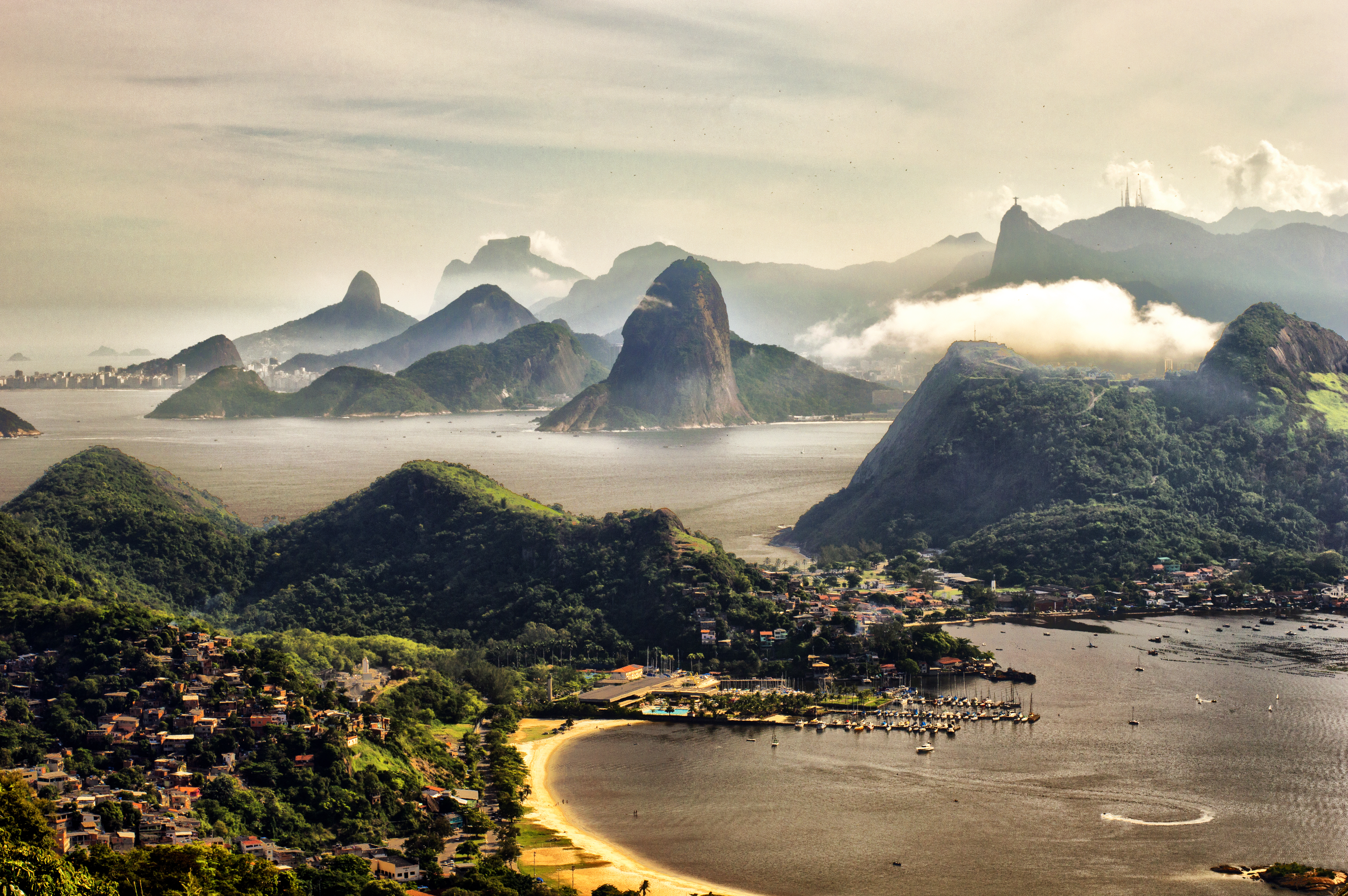 Rio de Janeiro visto do Parque da Cidade,em Niterói.